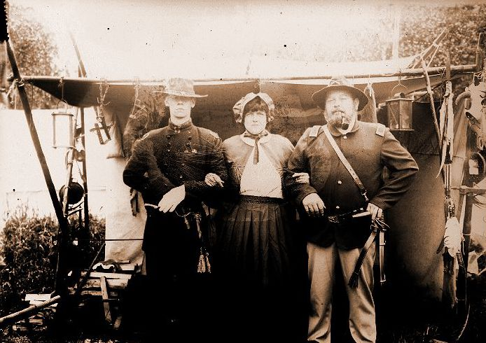 Argyrotypie: Aufgenommen am 2.6.2001 auf dem Westerntreffen in Quickborn/Schleswig Holstein. Die Aufnahme entstand mit einer historischen 13x18-Plattenkamera (Optik: 18cm Goertz Doppel-Anastigmat, ca. 3 Sekunden Belichtungszeit) zunächst auf eine Chlor-Bromsilber-Trockenplatte (selbst hergestellt mit der orthochromatischen "Tetenal Work Photographic Emulsion"). Anschliessend wurde die Photoplatte mit dem "Photospeed Argyrotype-Kit" auf " Hahnemühle Aquarellpapier, 250g/m²" bei Sonnenlicht in einem historischen Kontaktrahmen auskopiert.